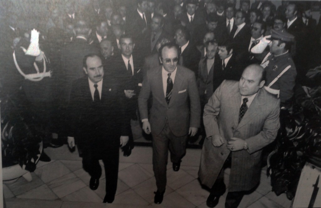 (De izquierda a derecha): Alcalde de Elda, Gobernador Civil de Alicante y Alcalde de Petrel; el sábado 27 de enero de 1973 en la constitución de la Mancomunidad de ambos municipios.